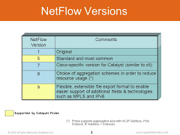 Монгол: Зураг2 Нэтфловын хувилбарууд